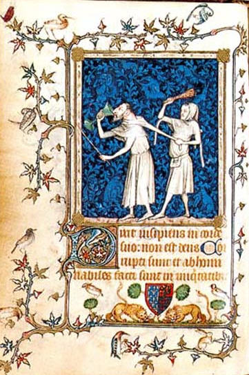 Žaltář Bony Lucemburské